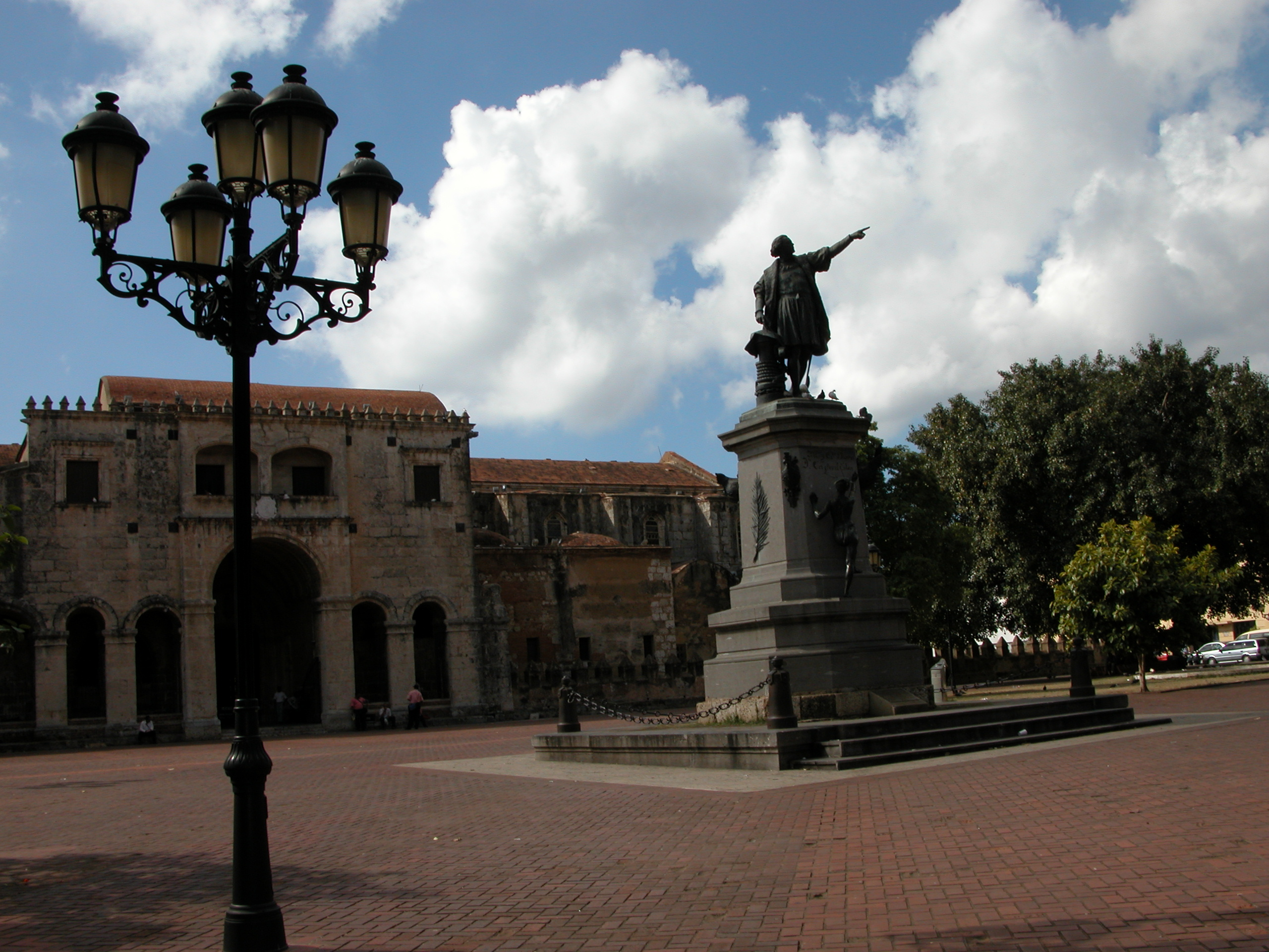 Parque Colon